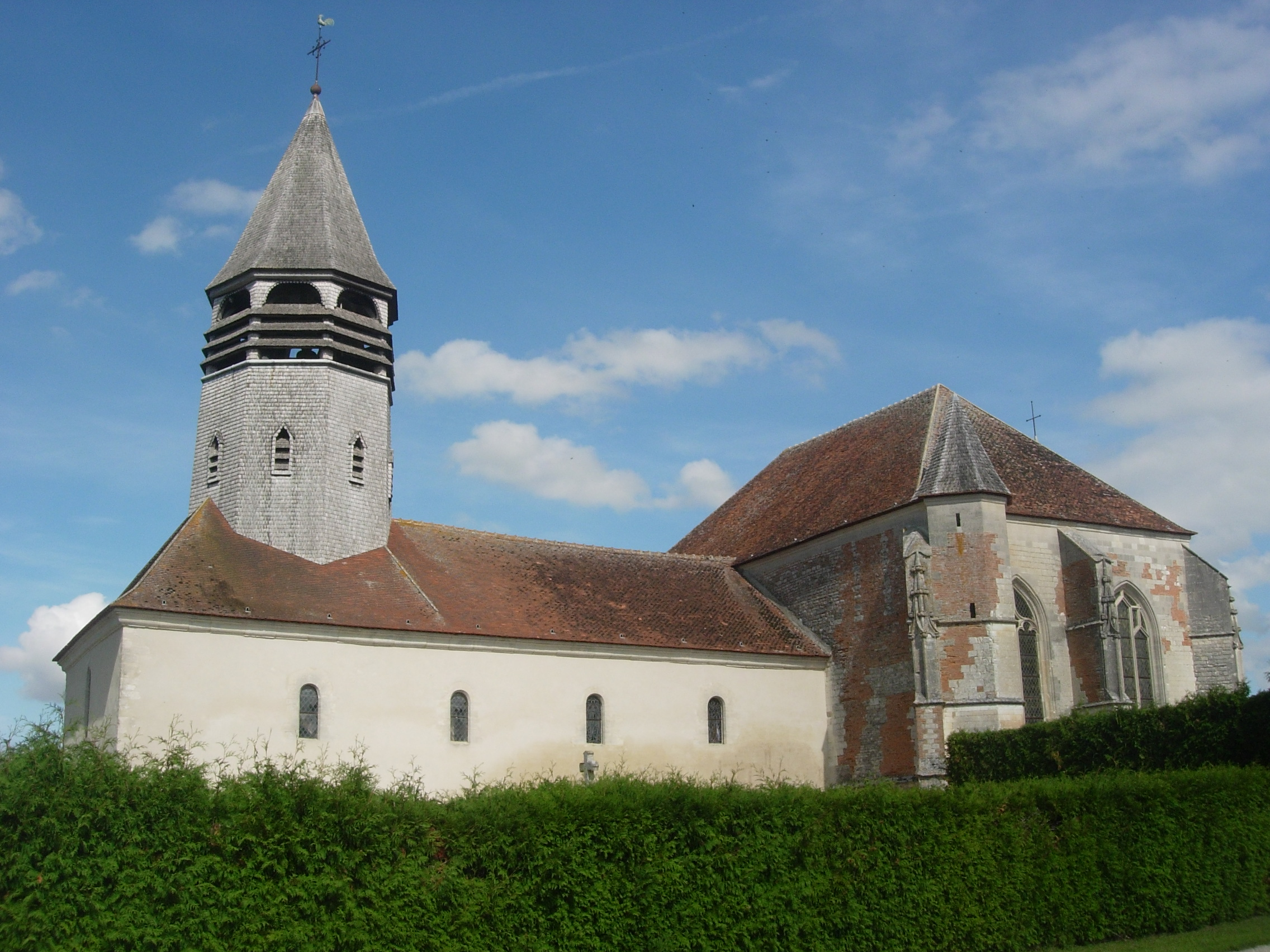 Eglise de Vallentigny